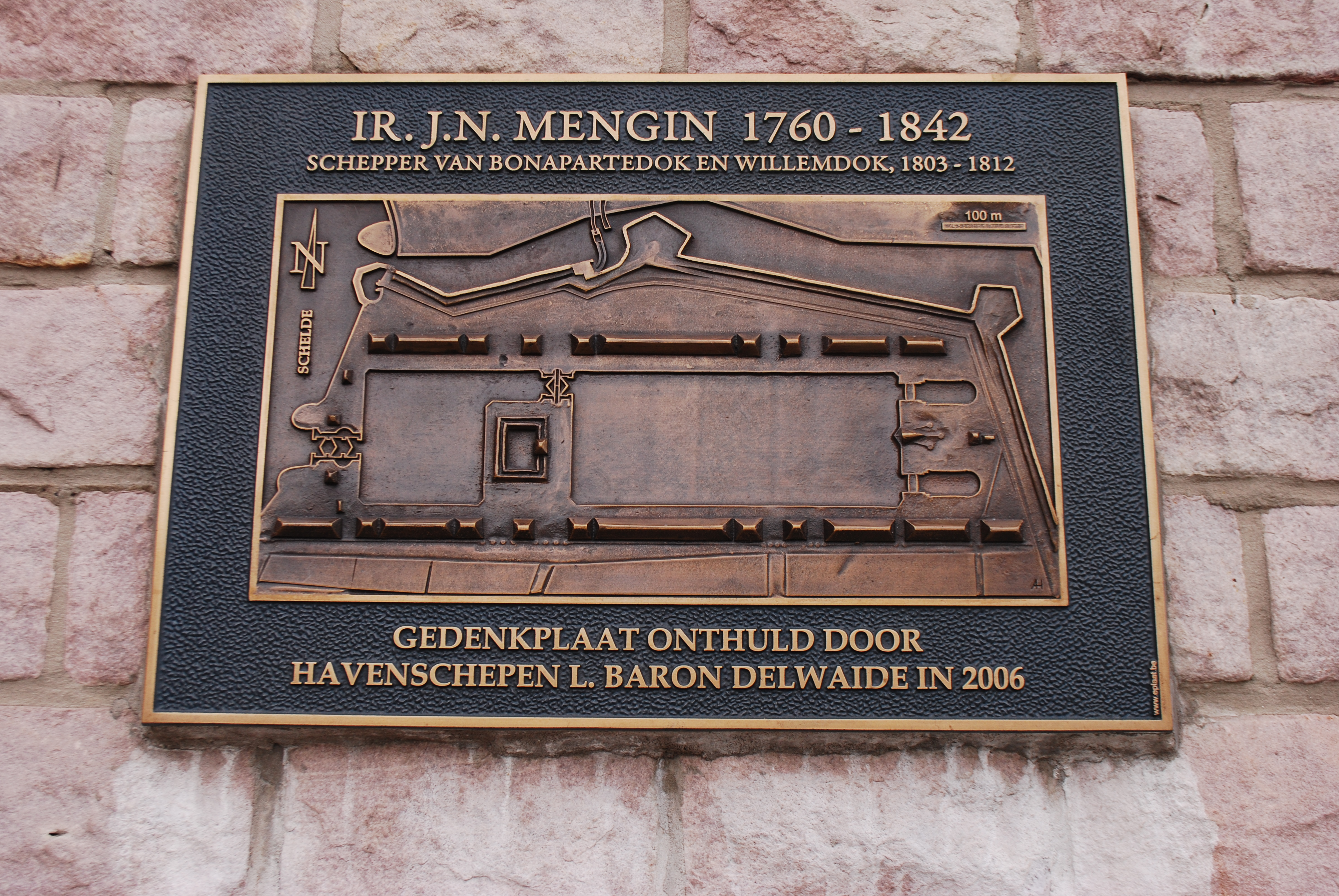 Plaque commémorative sur le bâtiment de manoeuvre du pont de Nassau à Anvers.